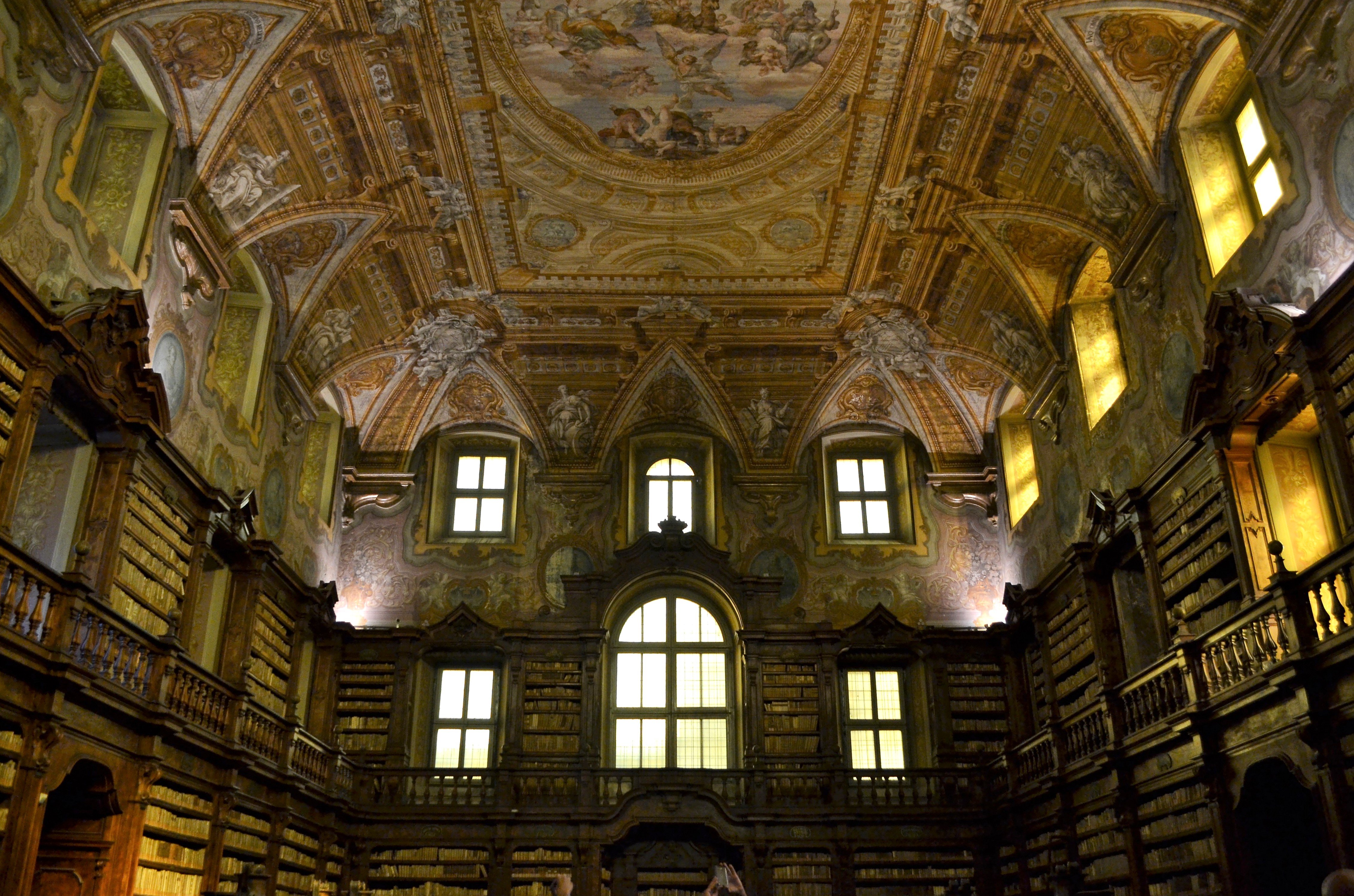 Sala Giambattista Vico.